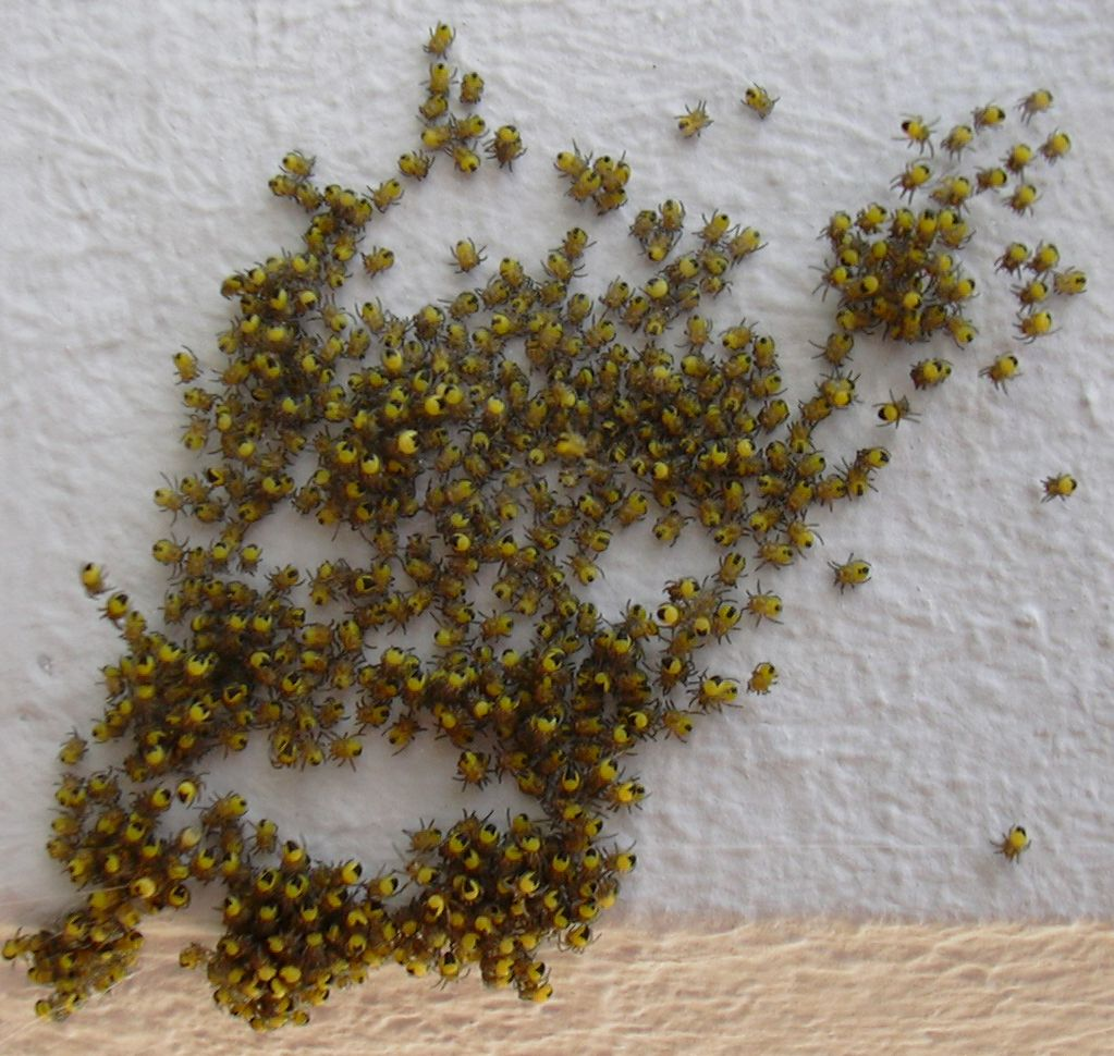 Ein Spinnennest - selbst fotografiert Anfang Mai 2005